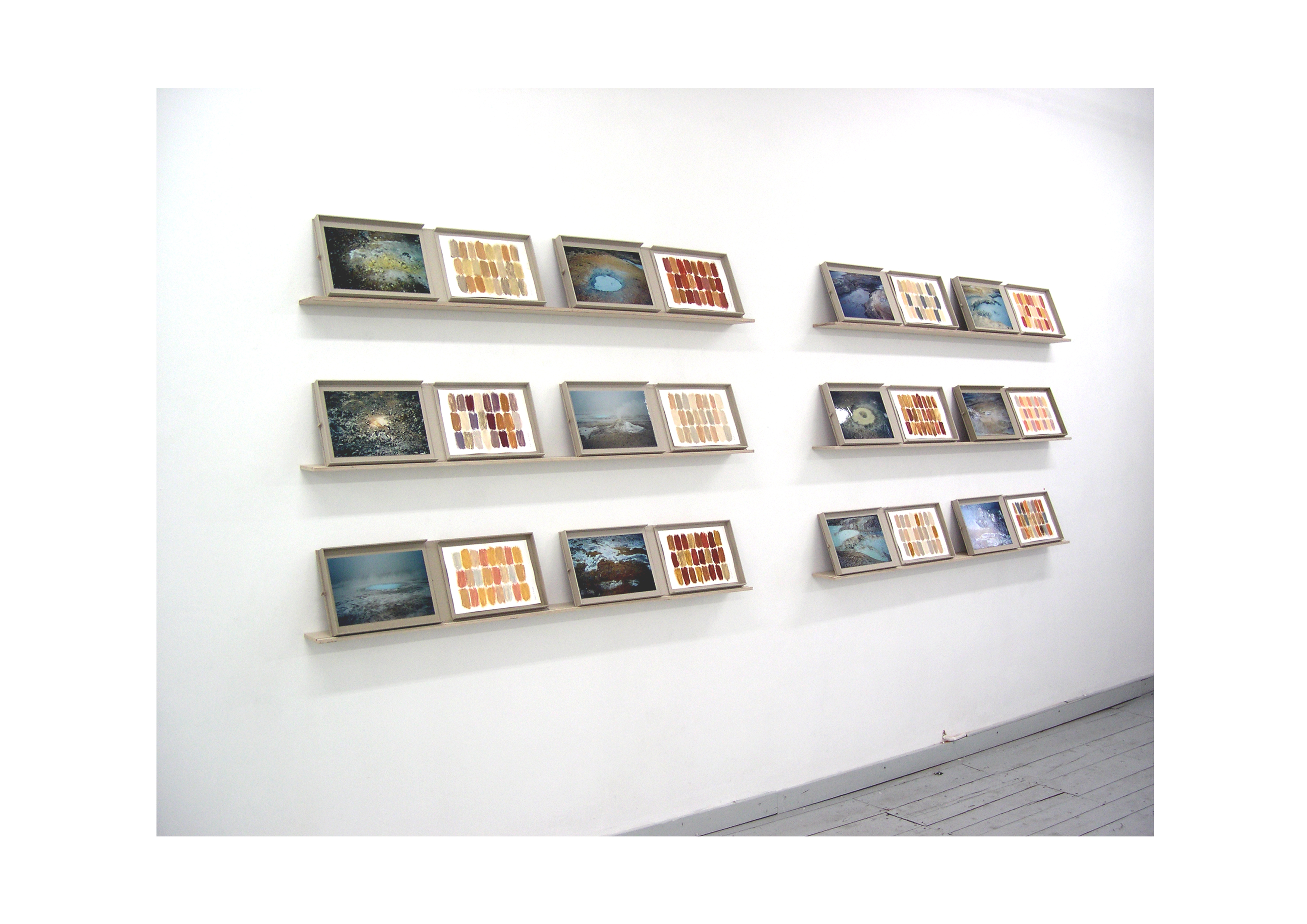 ‘IJslandboeken’, 2002, gemengde technieken, 26 x 72 cm (per opengeslagen boek)